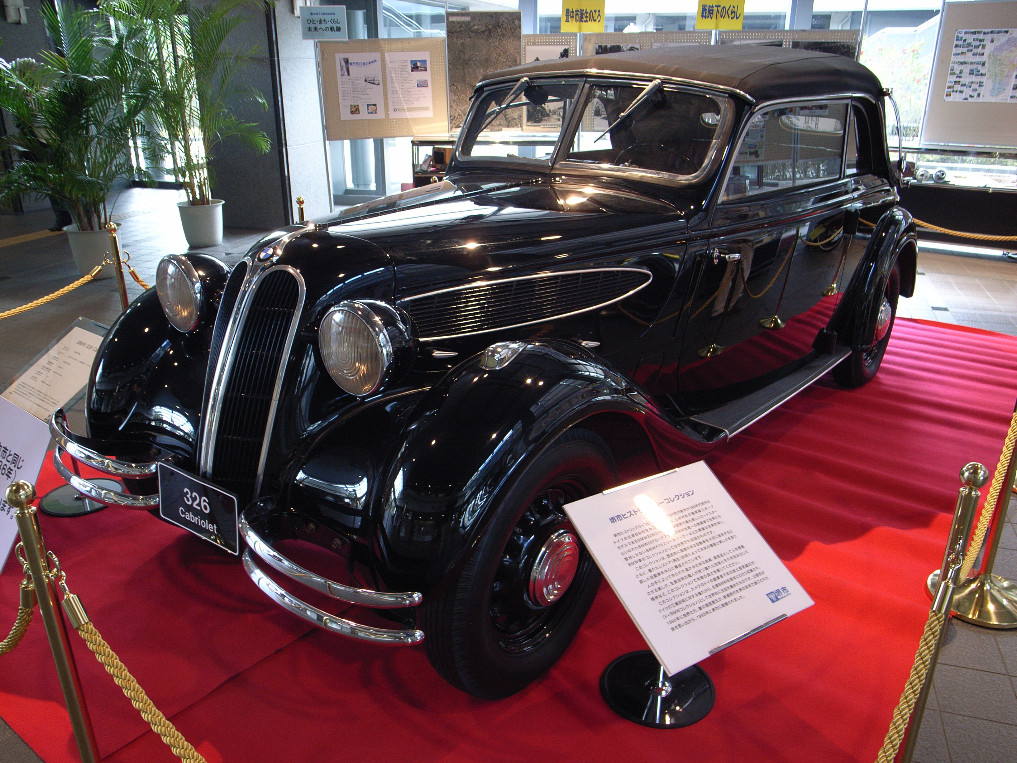 BMW 326 Cabriolet, 1936 1971 cc WC L6 OHVBMW 326 Cabriolet